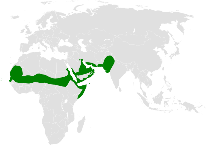 Eremopterix nigriceps distribution map based on